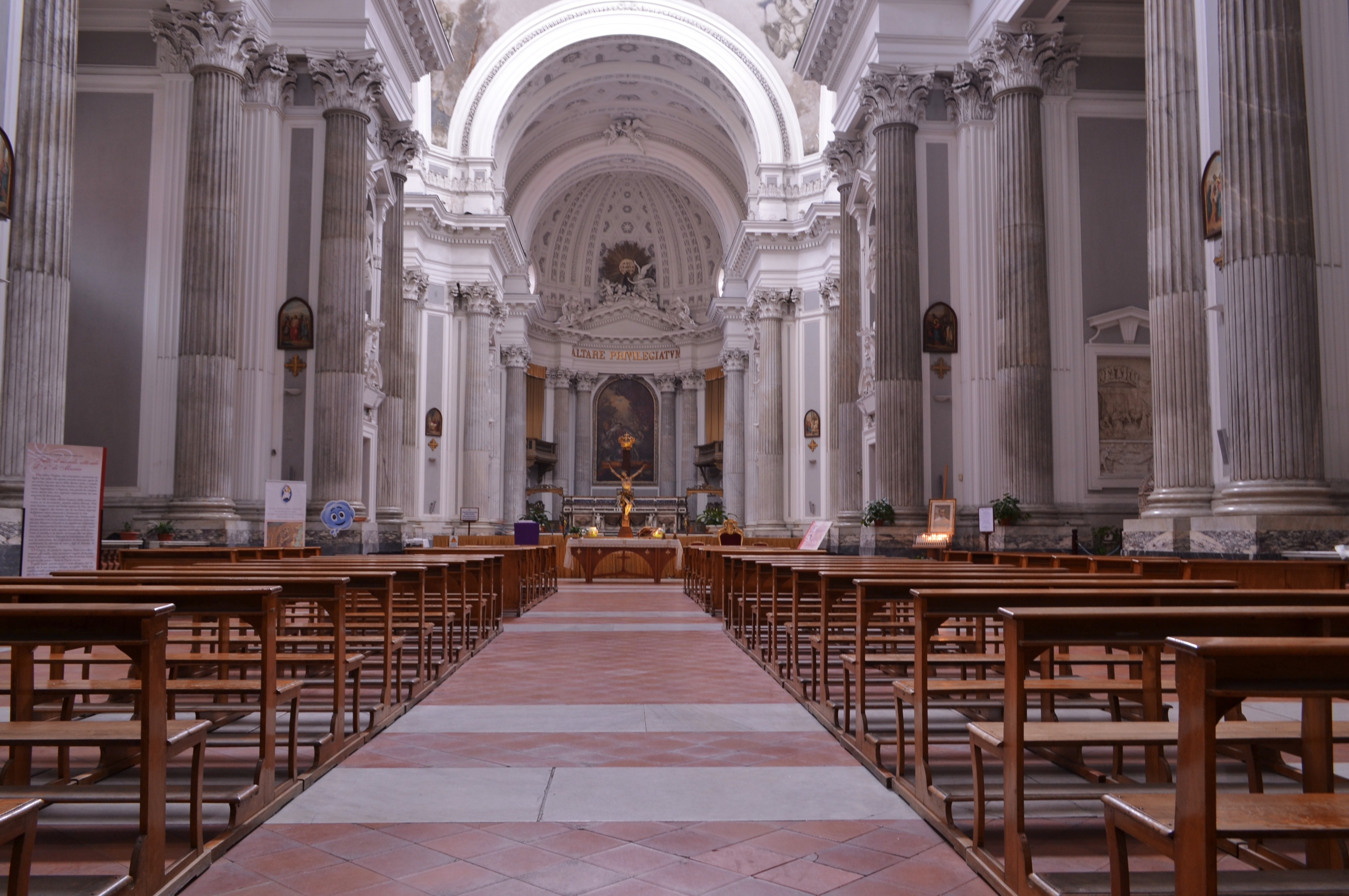 La navata.